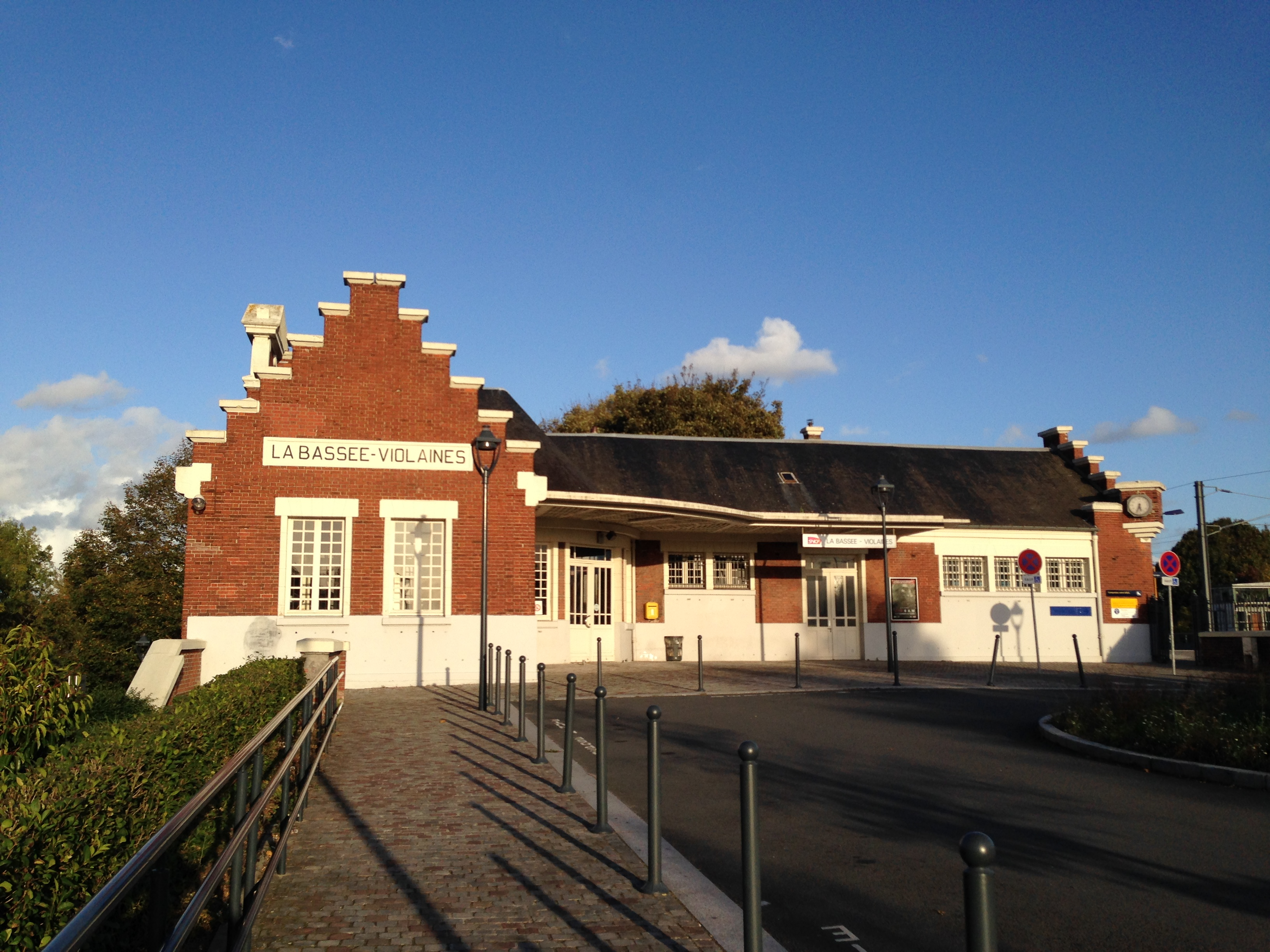 Gare de la Bassée - Violaines en 2017